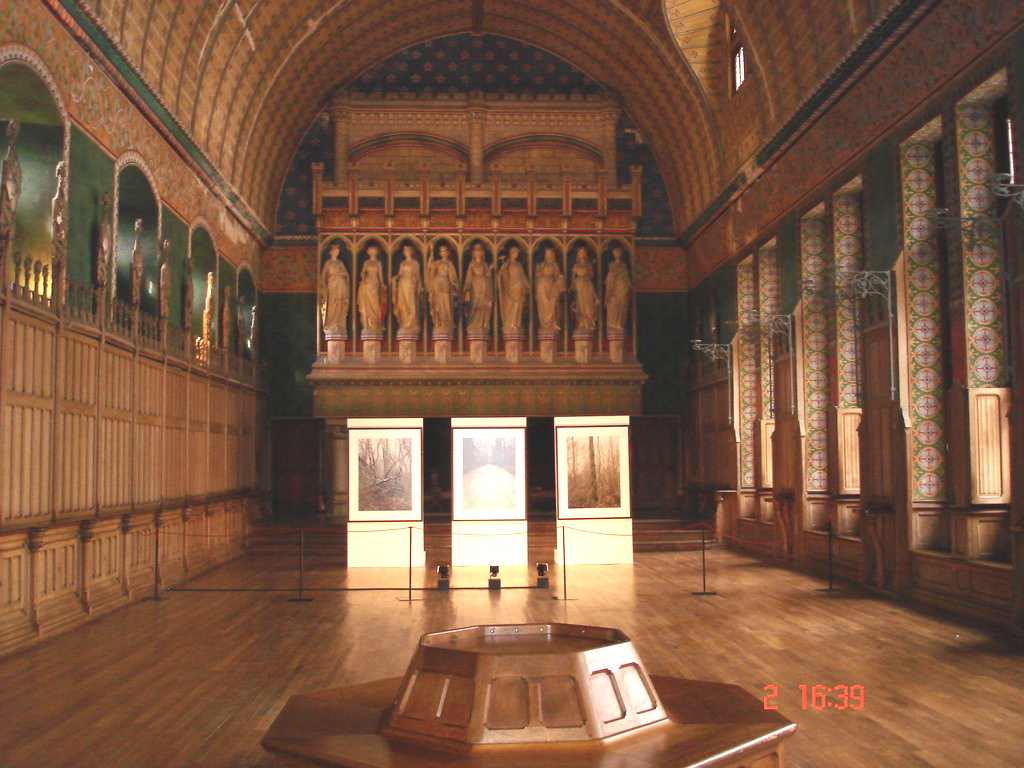 Un couloir du château de Pierrefonds, photo prise par mes soins en avril 2006.